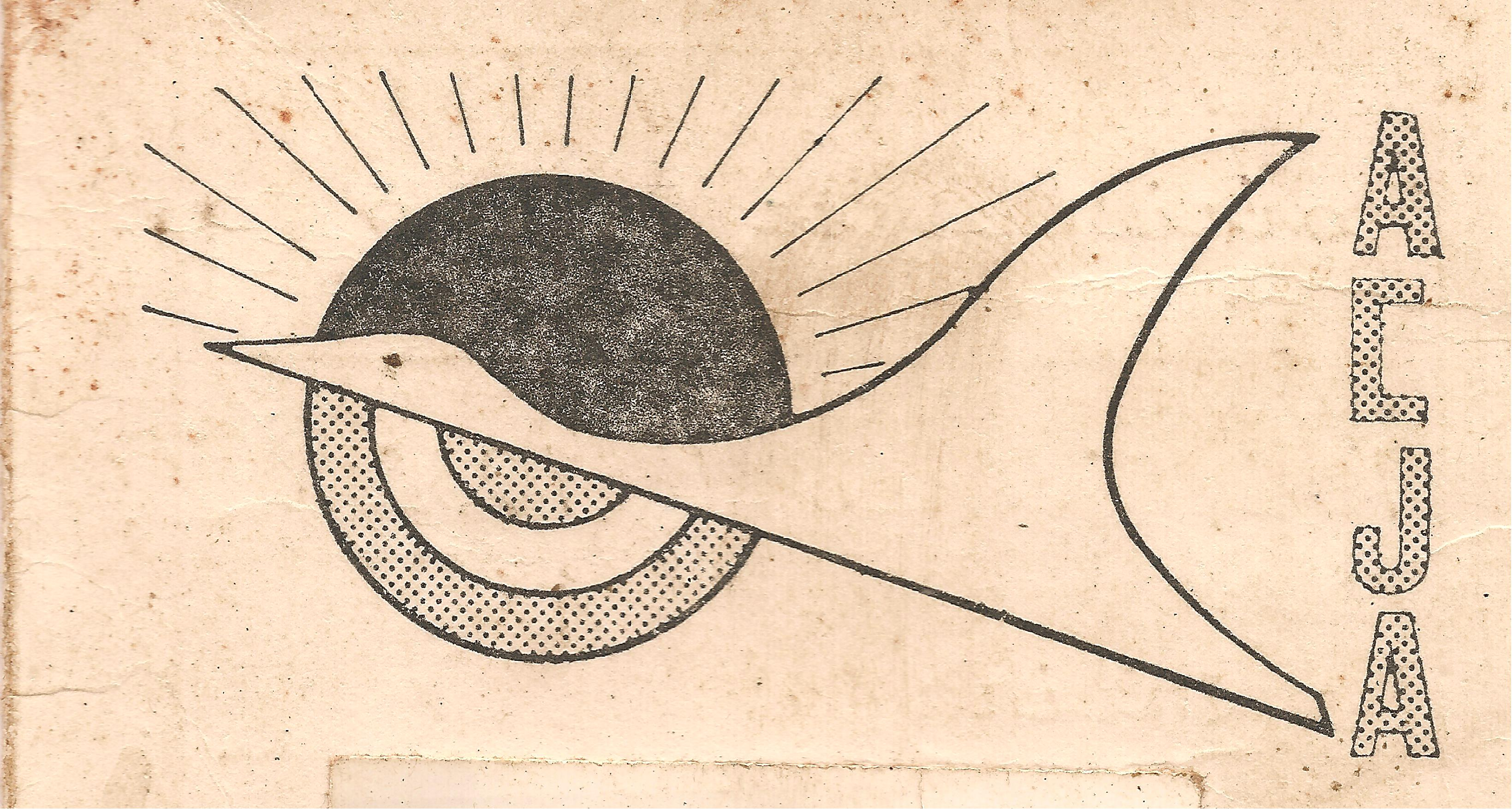 Primer logo original del Aero Club Jardín América (ACJA). (1979, año de fundación). Fuenteː Periodista Horacio Cambeiro.